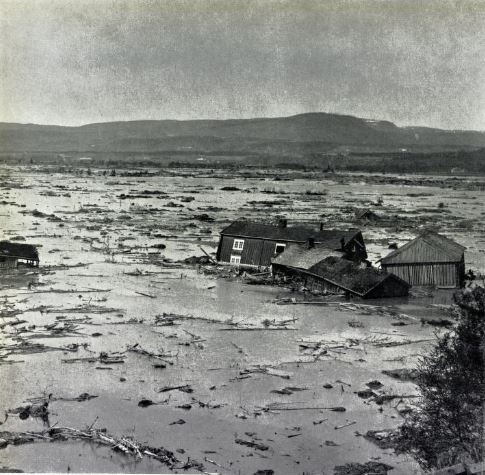 Trær og hus flyter i leire etter Verdalsraset i 1893. Reprofoto.